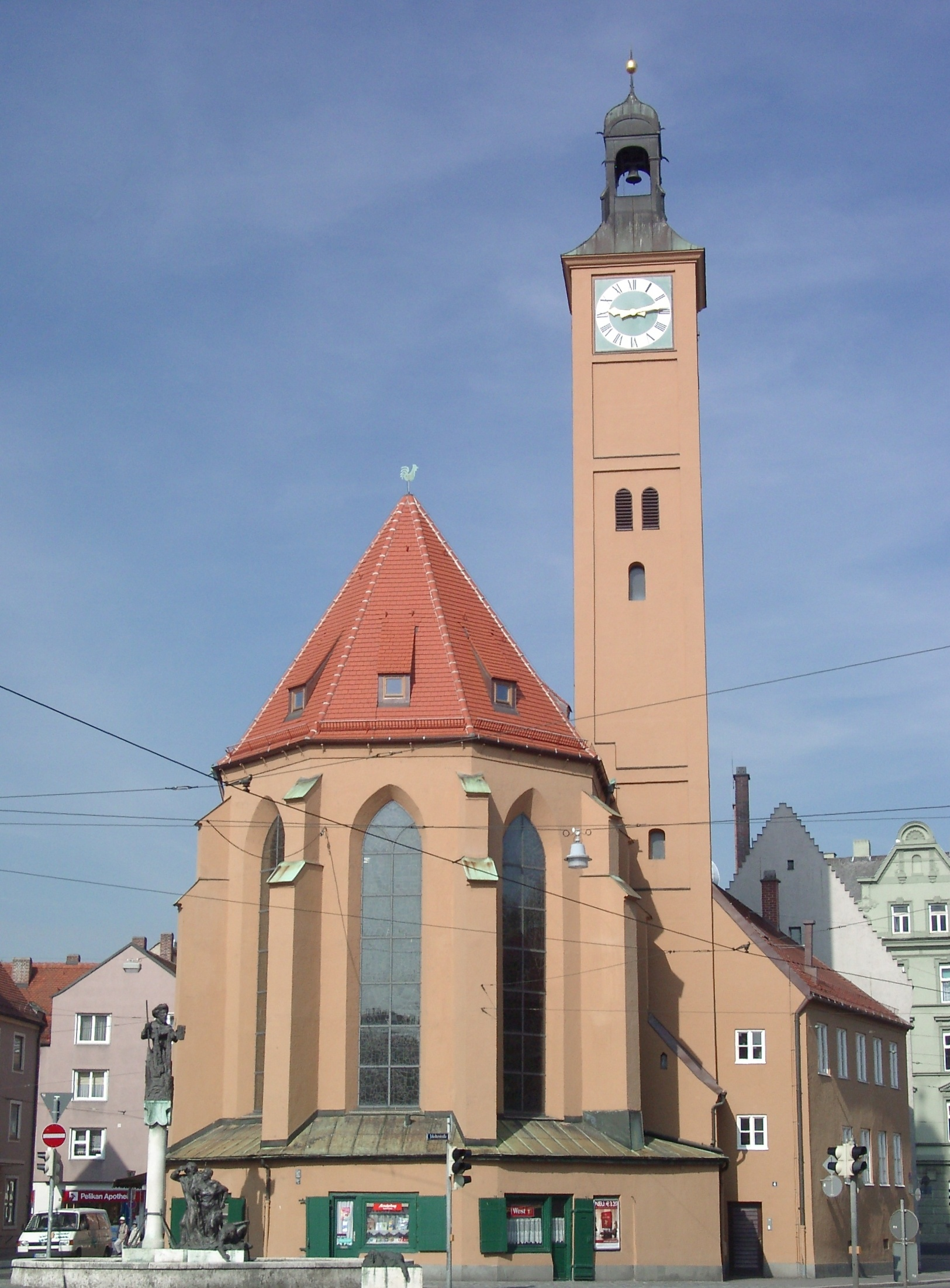 Augsburg Kirche St. Jakob mit Brunnen und Jakobusstatue